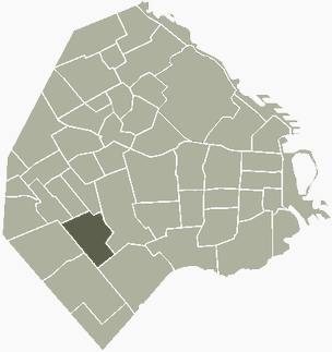 Barrio de Parque Avellaneda